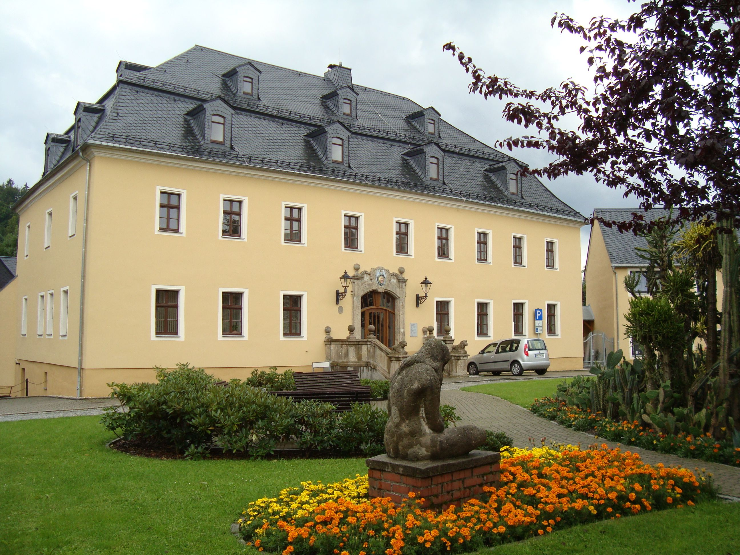 Rathaus (ehemaliges Rittergut) in Thum